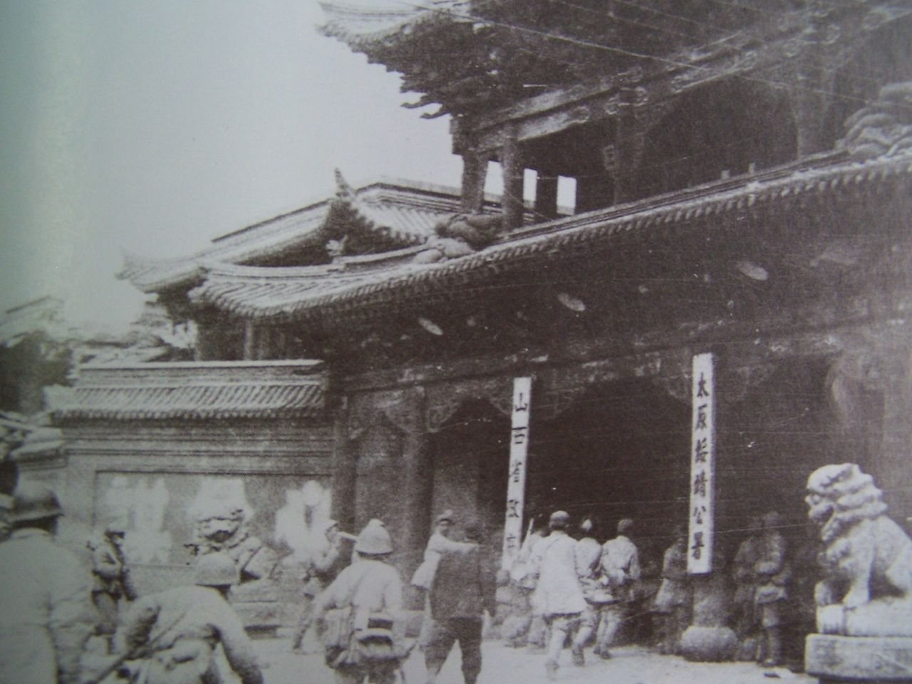 中文（中国大陆）: 太原战役